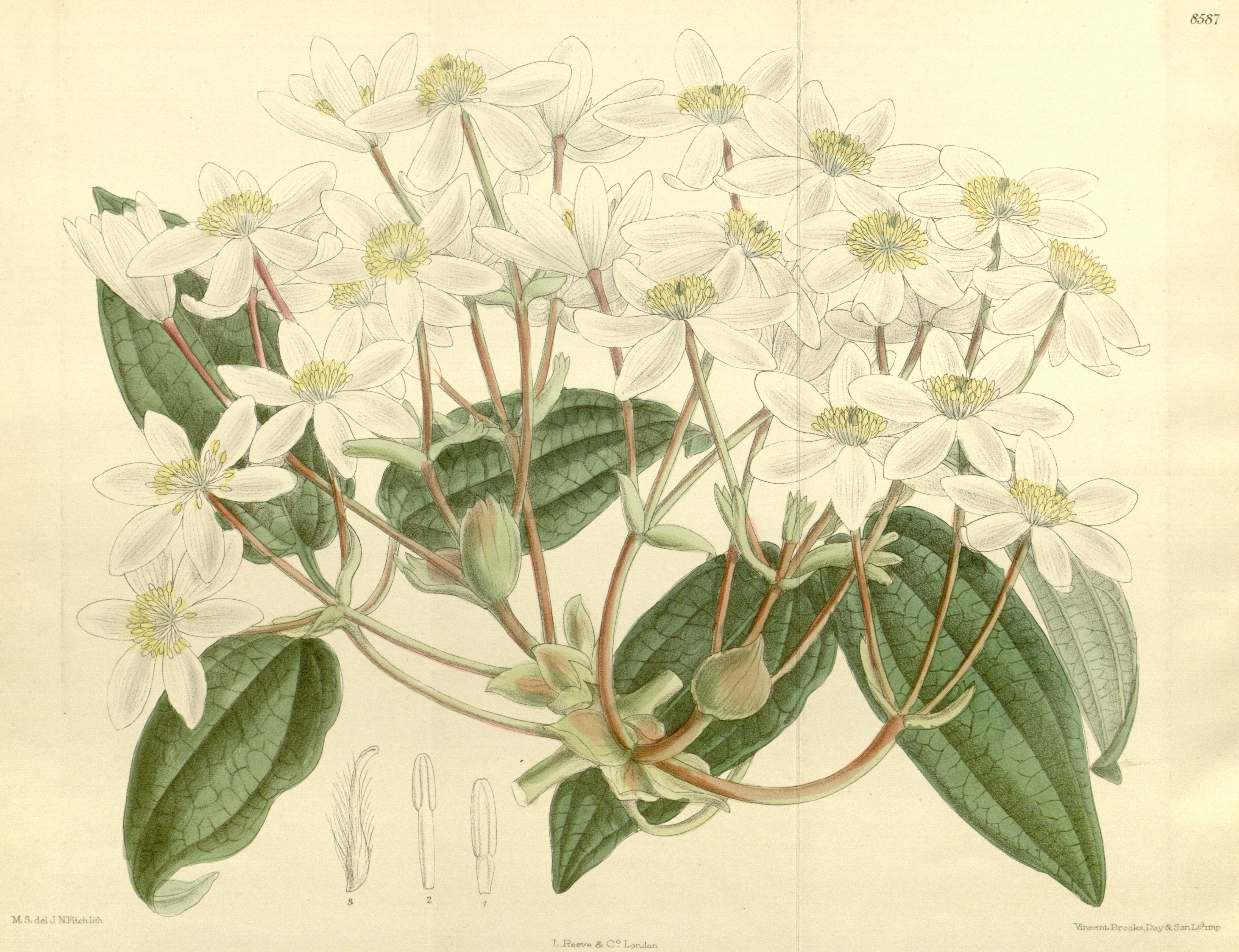 Clematis armandii, Ranunculaceae